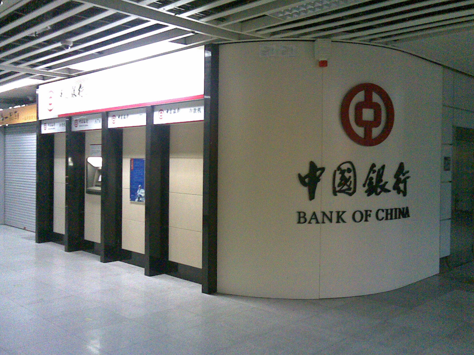 深圳地鐵內中銀櫃員機